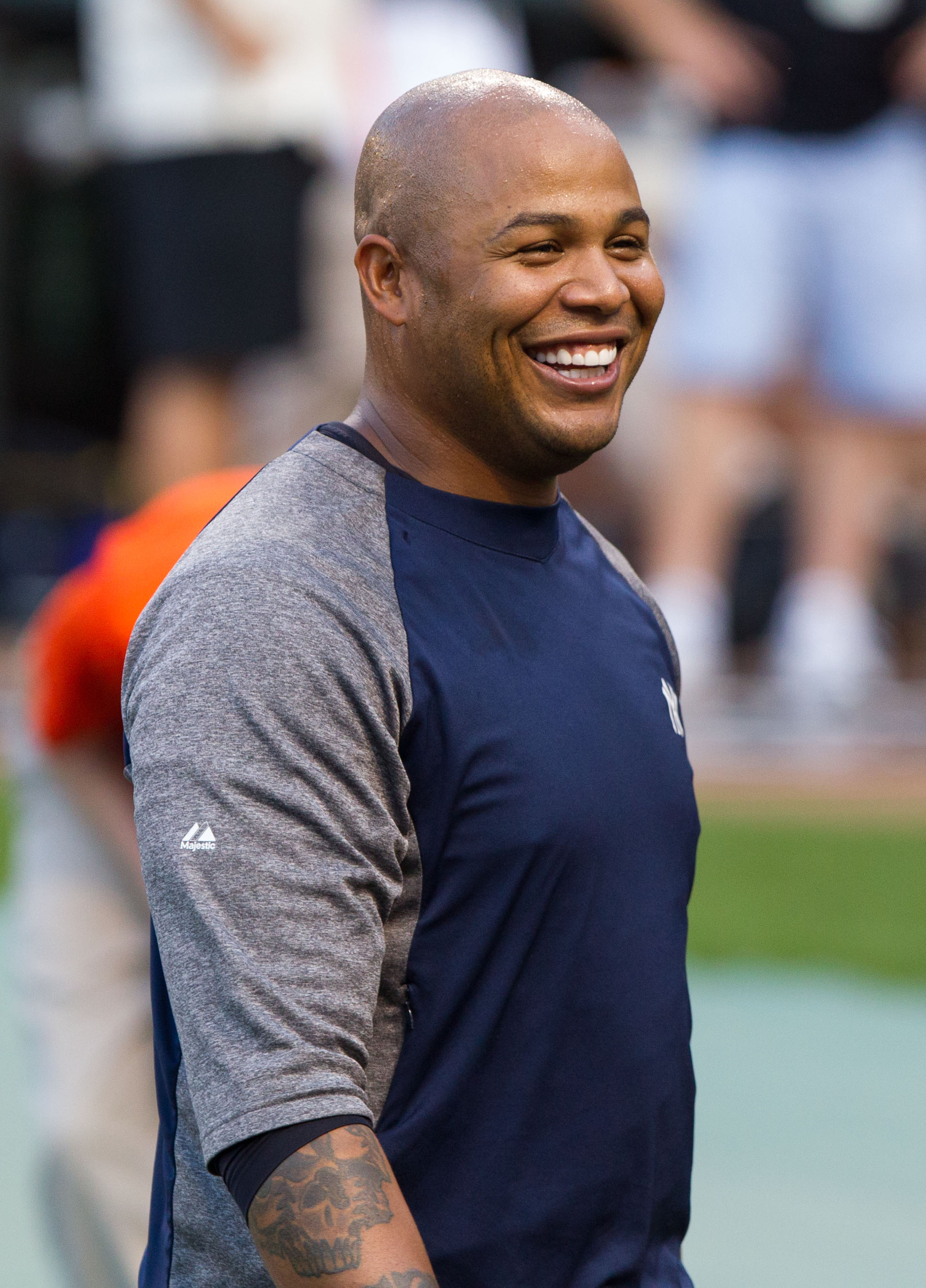 Andruw Jones